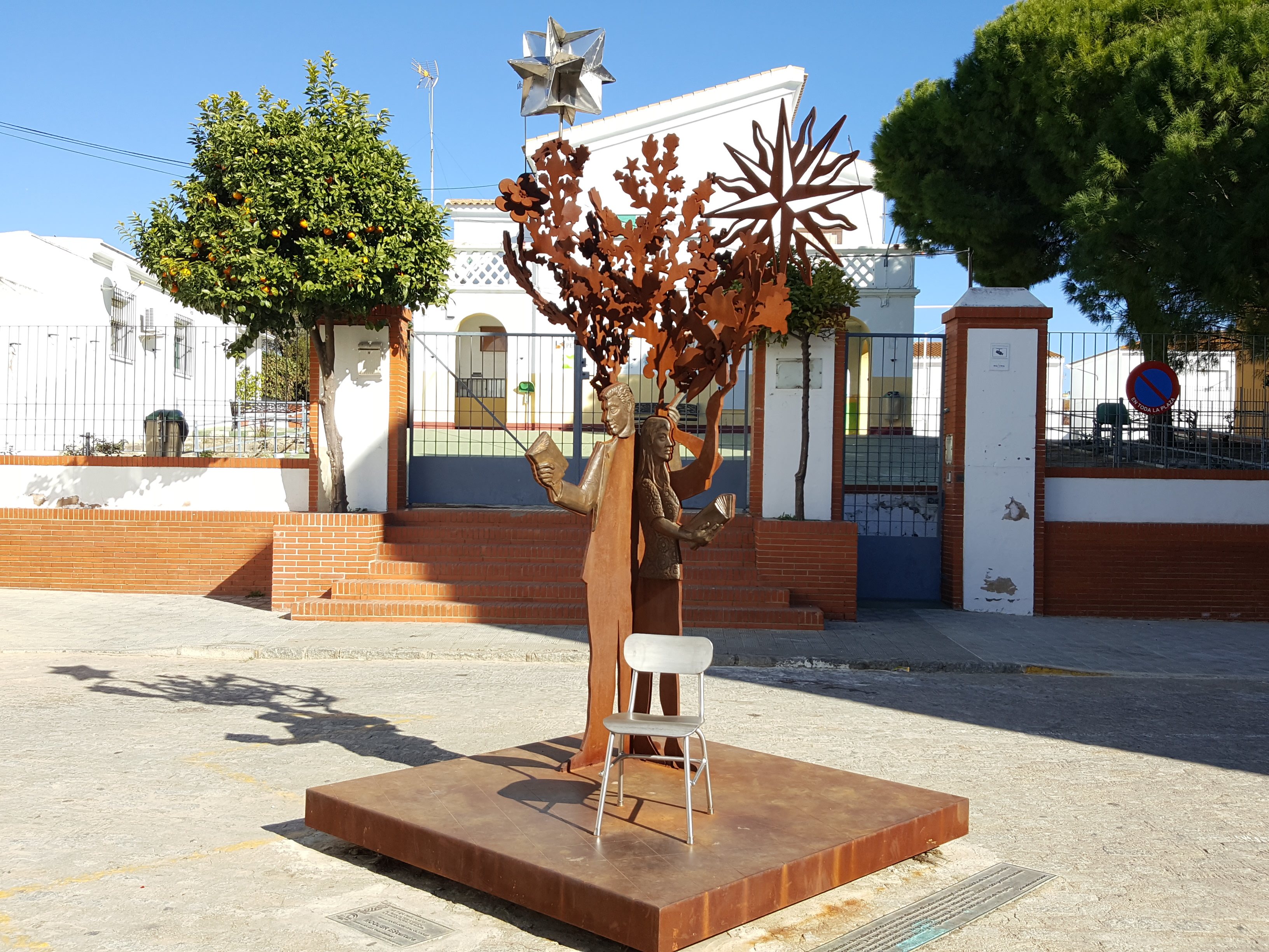 Escultura Perteneciente al Museo, al aire libre Moguer EScultura de Moguer, Andalucía (España). Escultura Incluida en la serie PlateroEScultura con el nombre "La miga".